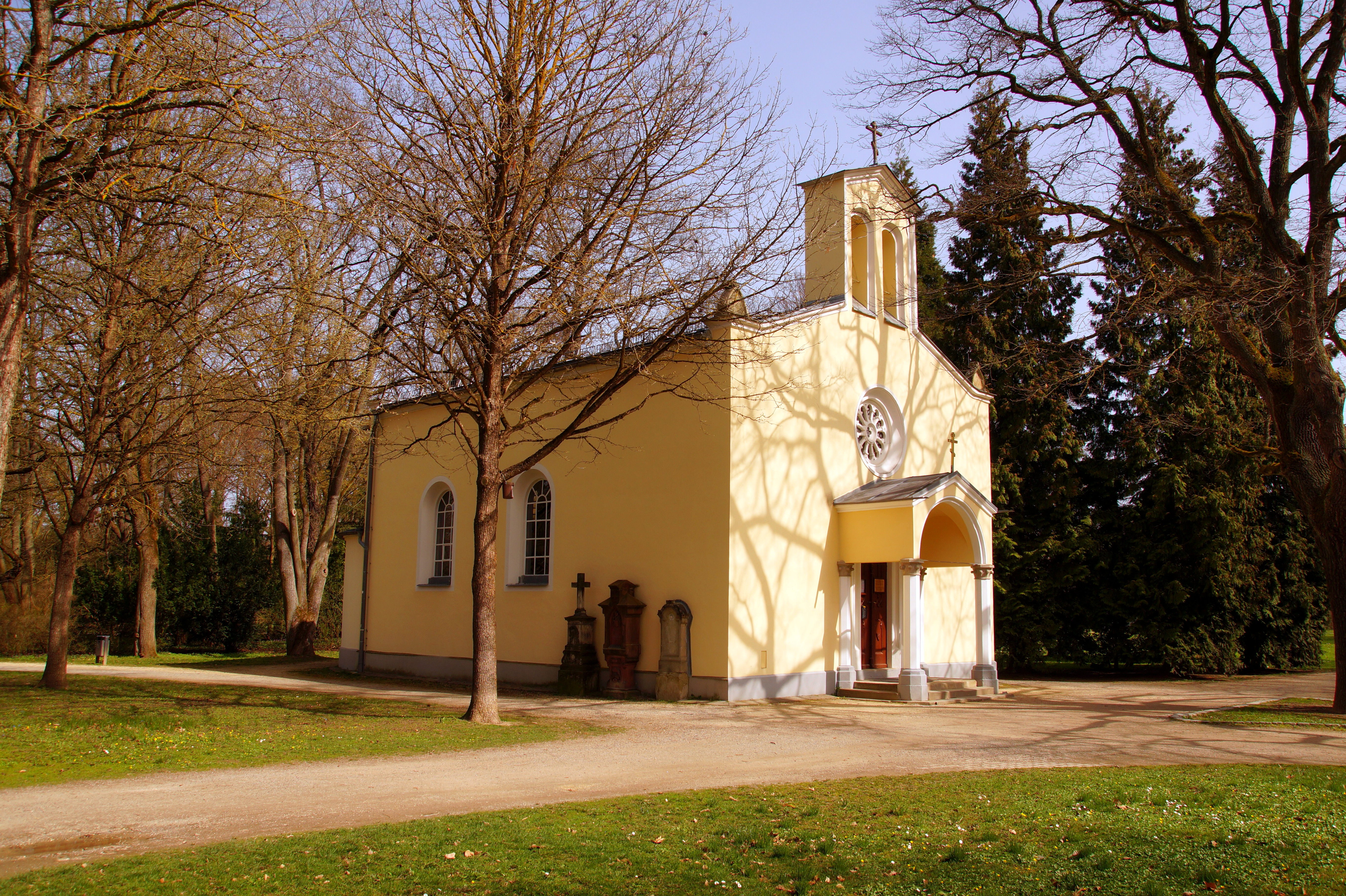 Regensburg